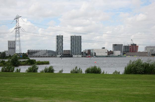 "Skyline" van Almere